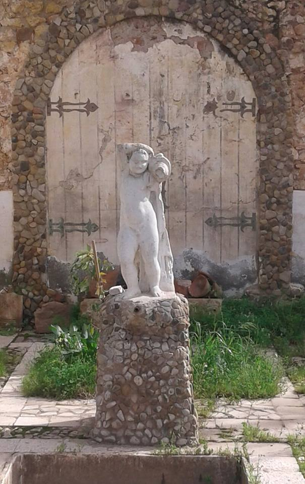 musée EL ASNAM